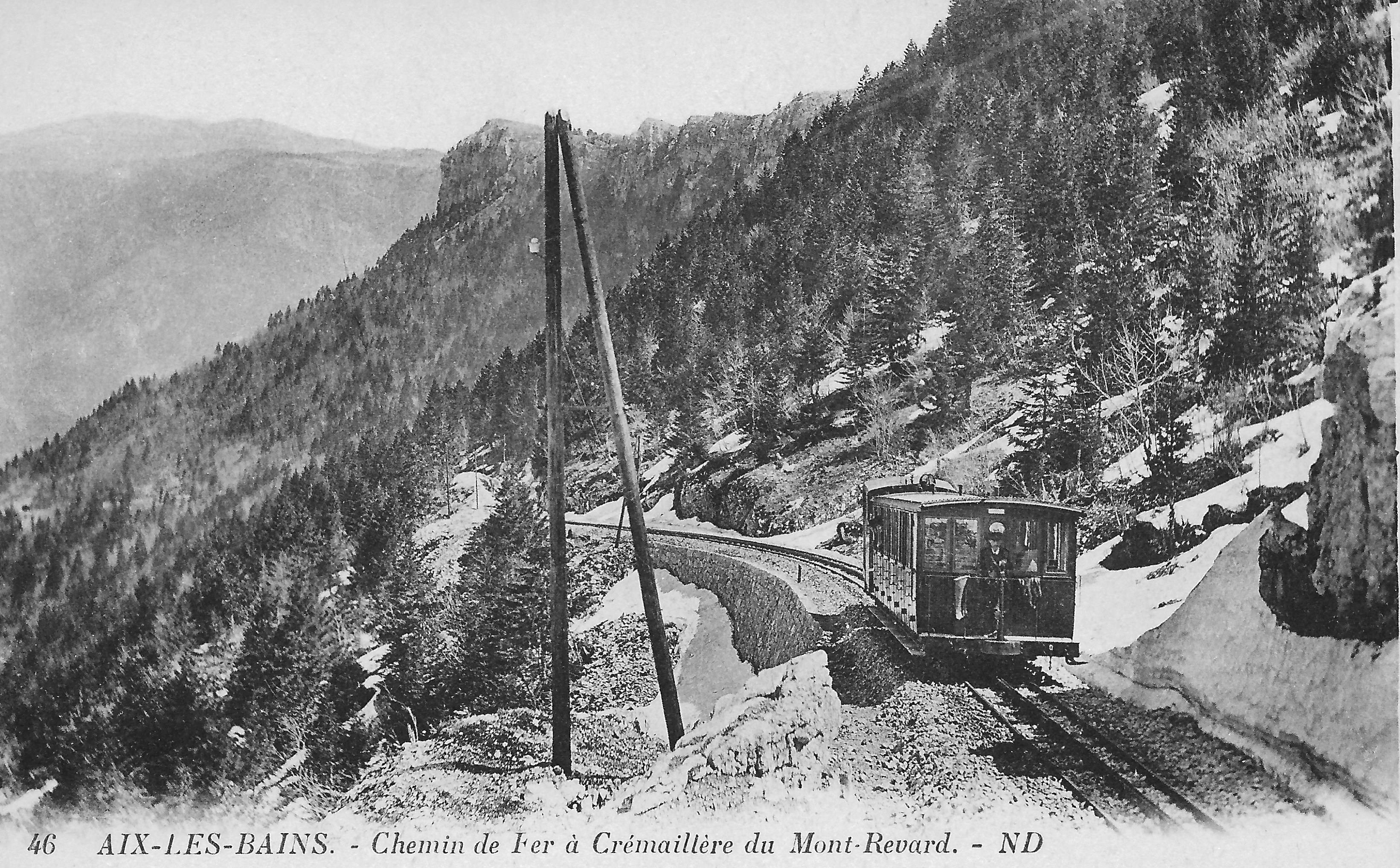 Briefkaart van de tandradsbaan naar Revard